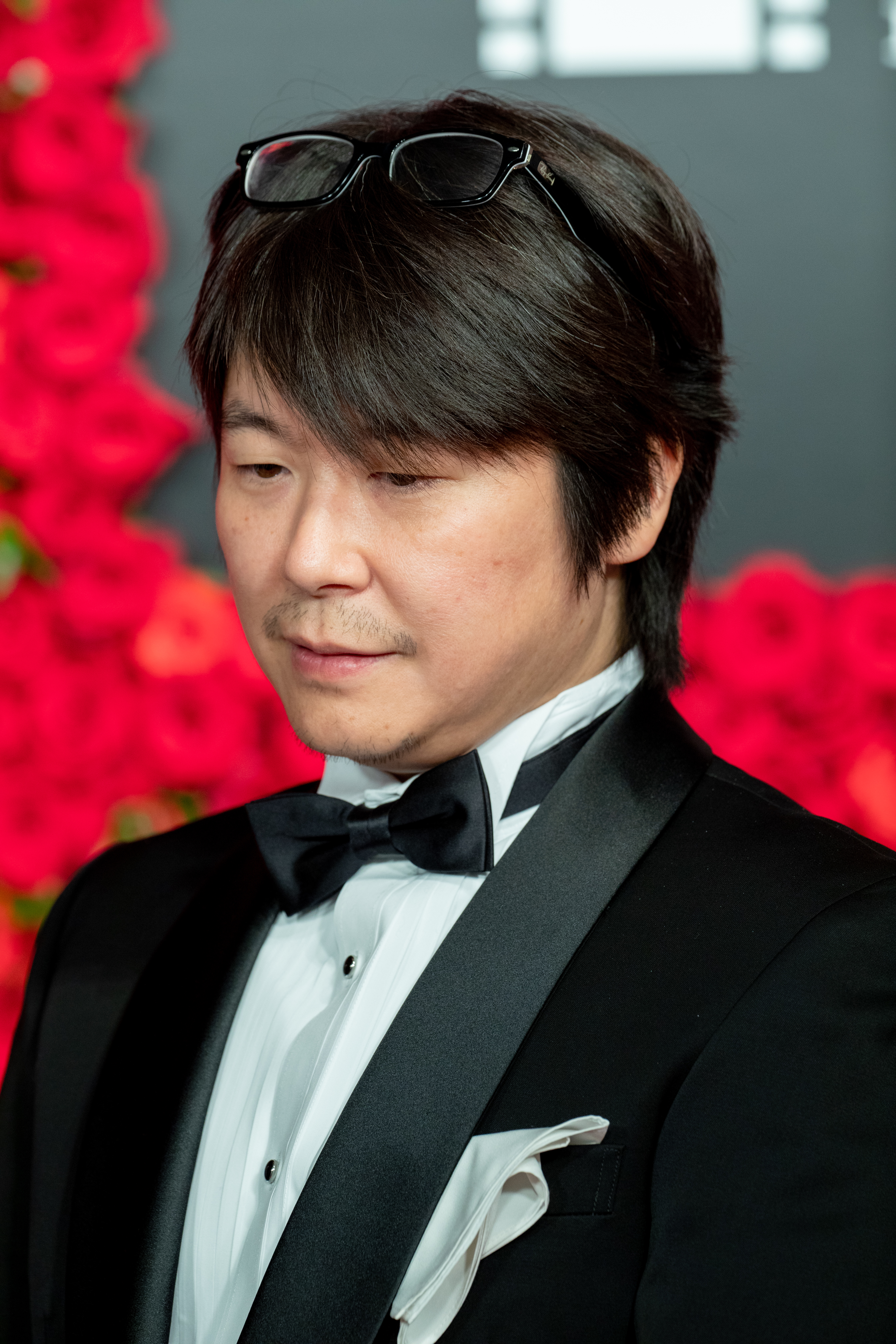 第30回 東京国際映画祭 オープニングセレモニー 静野孔文 (GODZILLA 星を喰う者)